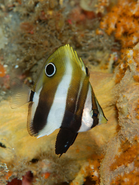 タキゲンロクダイ Coradion altivelis